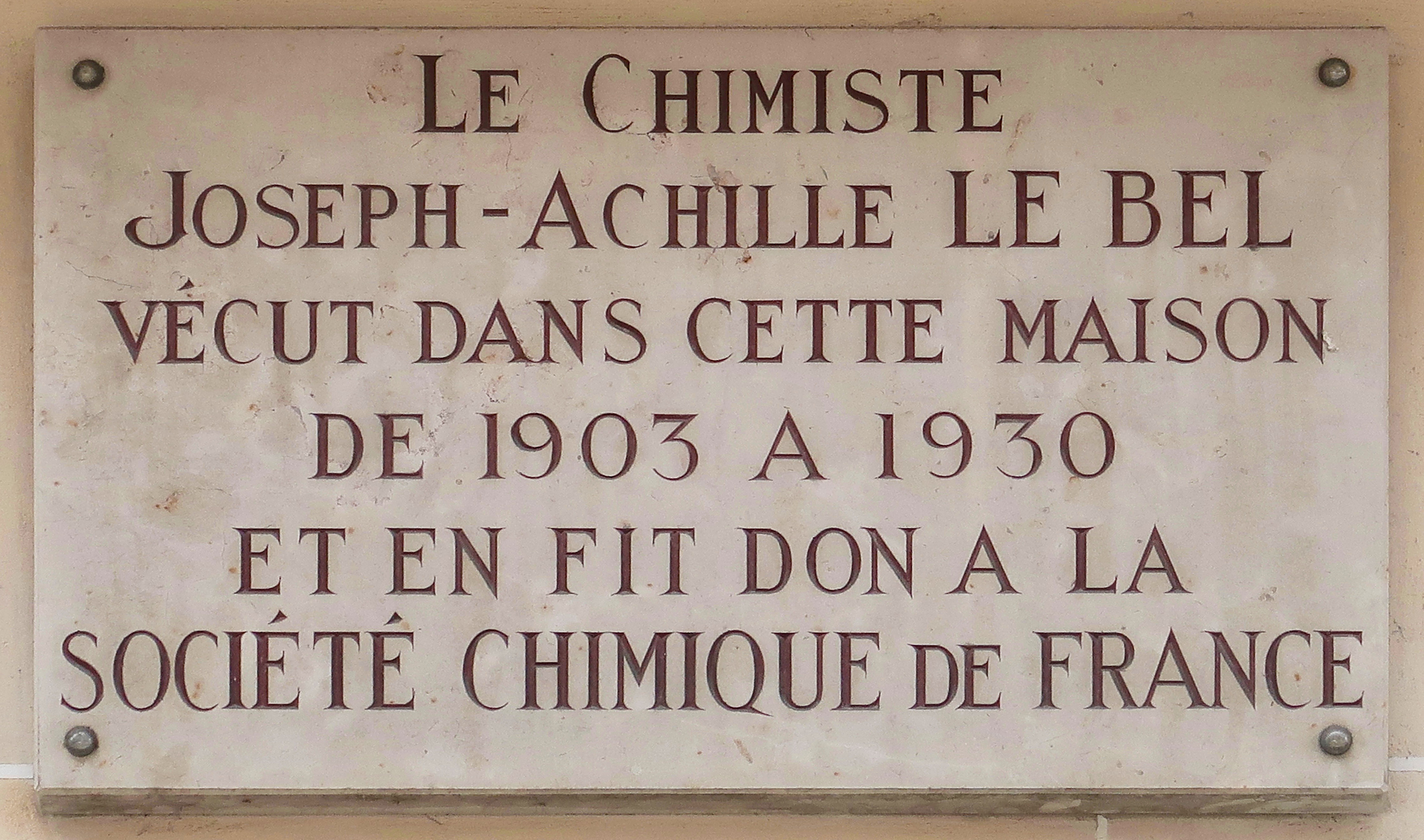 Plaque en hommage au chimiste Joseph Achille Le Bel, n°250 rue Saint-Jacques (Paris, 5e).